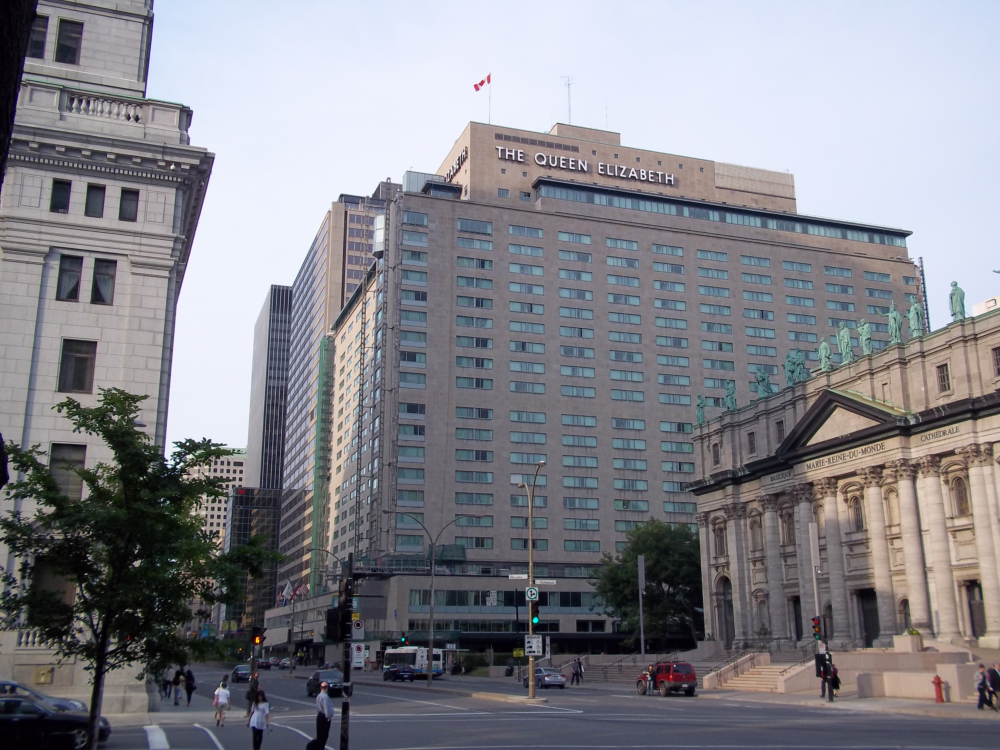 Hôtel Le Queen Elizabeth, 900, boulevard René-Lévesque Ouest, Montréal